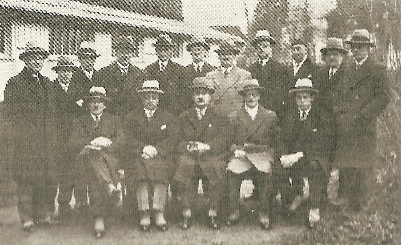 RC Strasbourg - Comité central en 1930 De gauche à droite. Devant : Ch. Nantz, Fernand Stehberger, Charles Belling, Joseph Heintz, Aug. Zinsmeister. Debout : Georges Fuss, Robert Schweyer, Albert Schweyer, F. Meyer, H. Felgenhauer, L. Fett, A. Merlet, Ch. Diss, Charles Lieber, A. Hess et Ketterer.